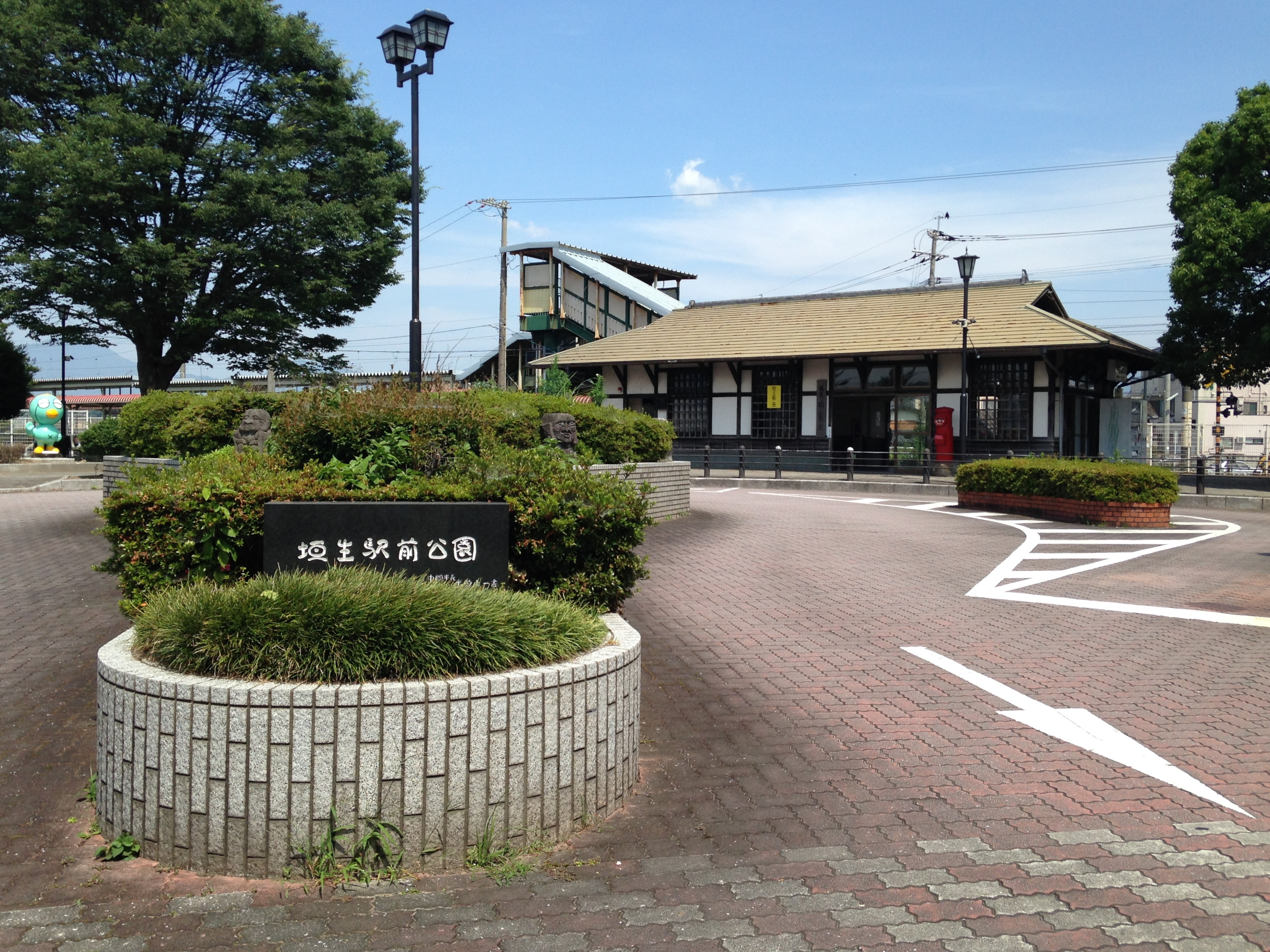 筑前垣生駅の駅舎と駅前公園